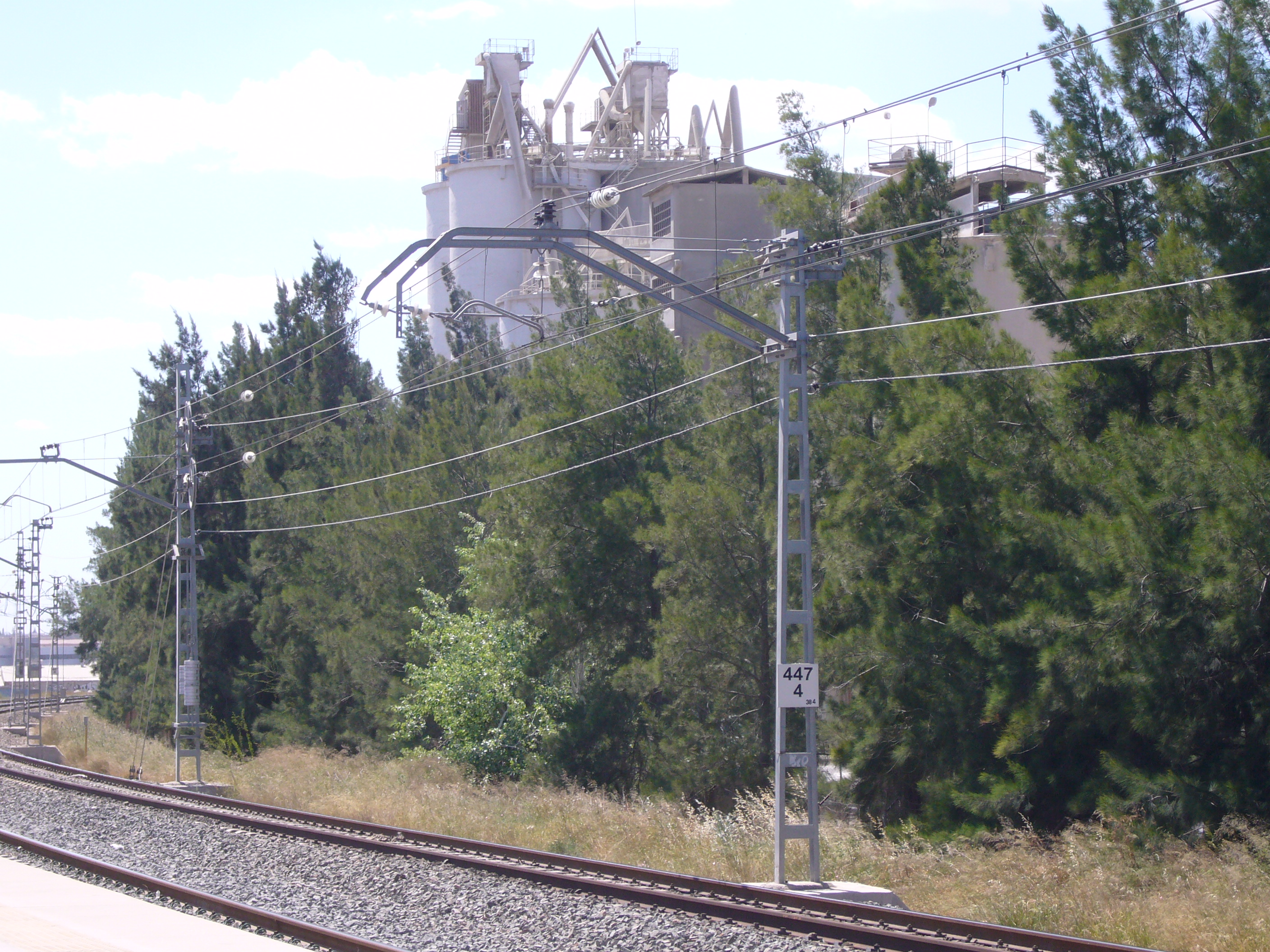 Vista parcial de las instalaciones de la cementera de San Vicente del Raspeig (Alicante) desde el apeadero del tren cercanías de la localidad.